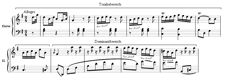 Anfangstakte aus Joseph Haydns Klaviersonate Hob. XVI/8